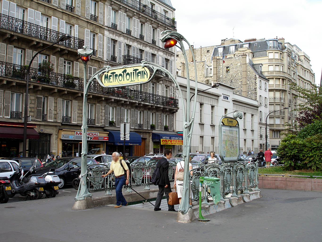 Station Rome de la ligne 2 du métro de Paris. Bâtiment de l'IUFM (Institut universitaire de formation des maîtres) sur le boulevard des Batignolles.